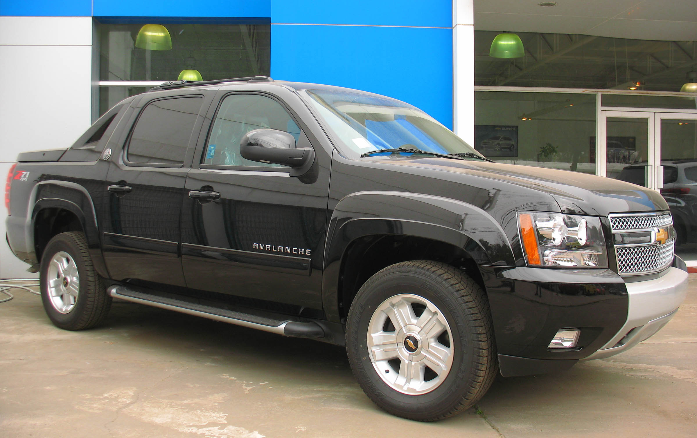 Chevrolet Avalanche Black Diamond